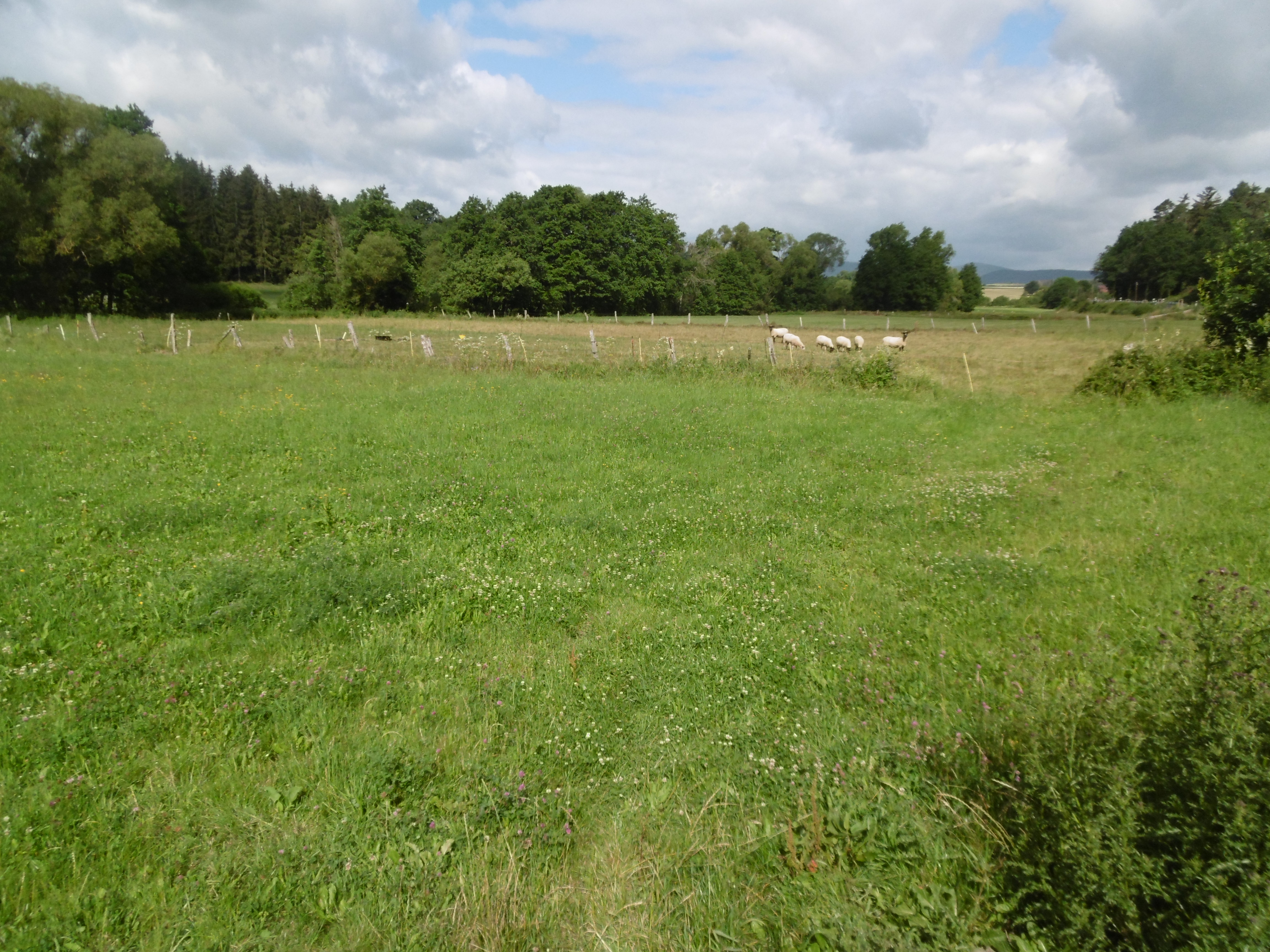 Naturschutzgebiet Orketal kurz vor der Landesgrenze (nördlich Straße nach Berge).